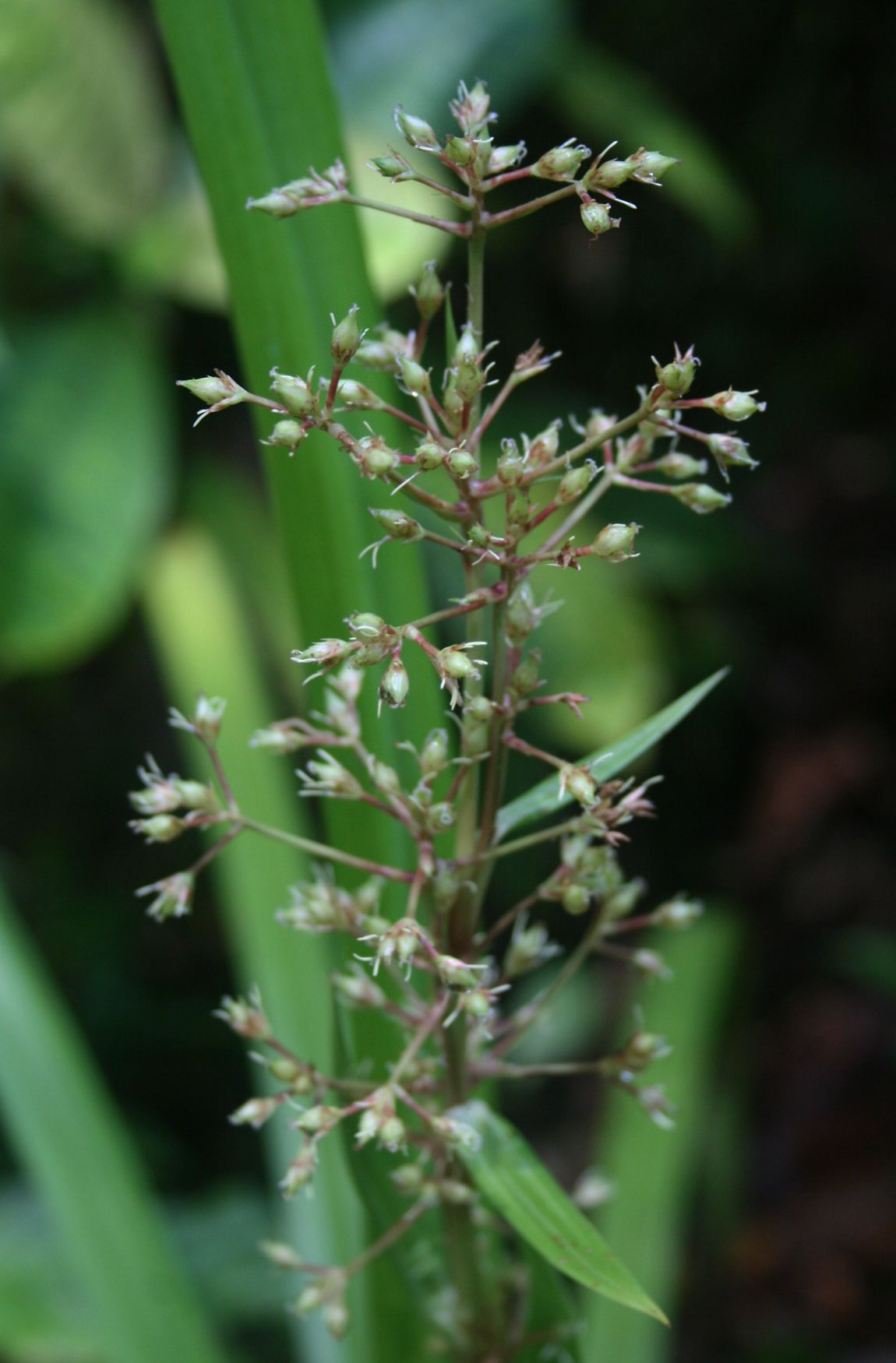 Becquerelia cymosa, Sauergräser (Cyperaceae) - Costa Rica: Prov. Puntarenas, La Gamba NW Golfito, zwischen "Fila Trail" und Valle Bonito